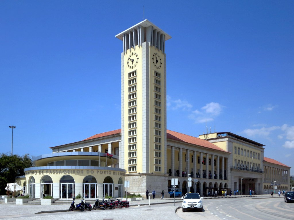 The Terminal Marítimo de Passageiros stands next to the port entrance at Luanda, Angola.